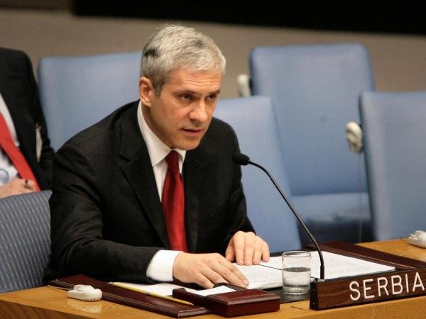 Борис Тадић, председник Србије, на ванредној седници Савета безбедности УН